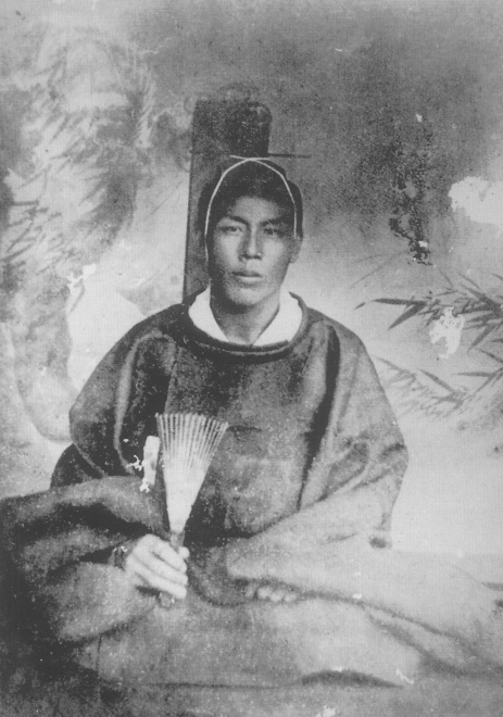 脇坂安斐。Wakisaka Yasuaya.